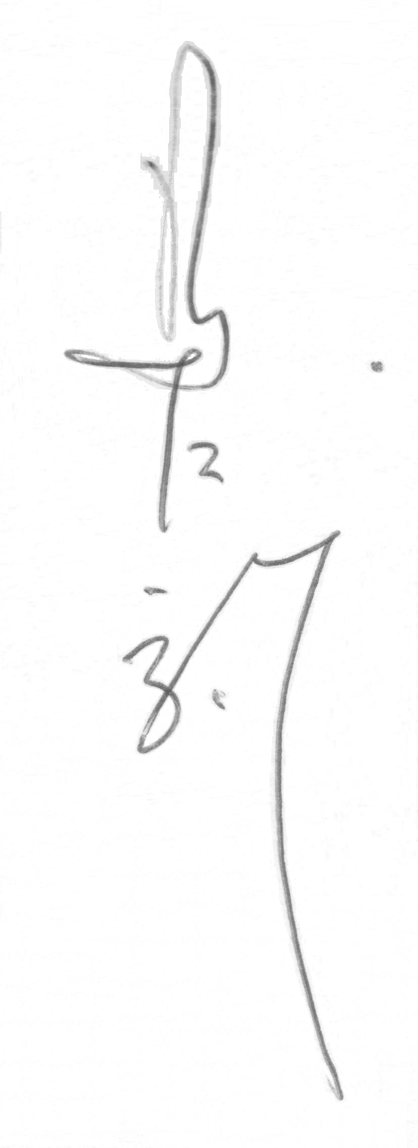 "Ma Jiangbao" in chinesischen Schriftzeichen